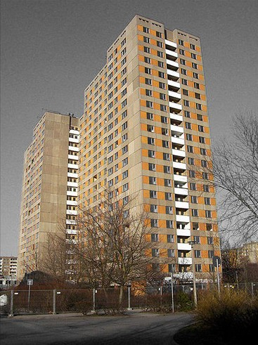 Doppelwohnhochhaus WGG GT 21/18 in Berlin, Oberweißbacher Straße, während des Abbruchs.